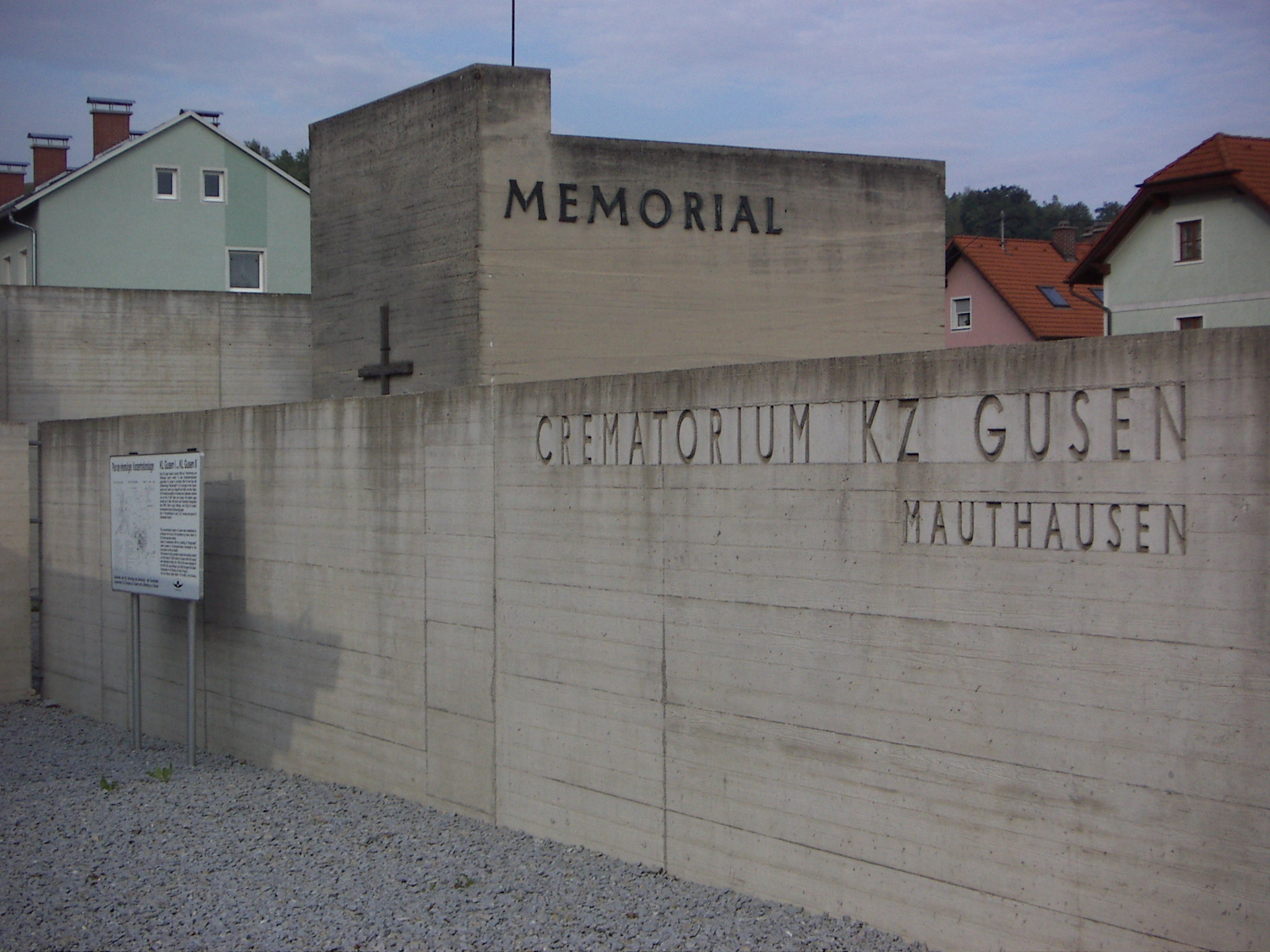 Entrance to Memorial Crematorium KZ Gusen